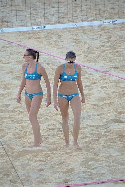 Marta Menegatti (1) Greta Cicolari (2) Italian pair, Quarter final USA vs Italy